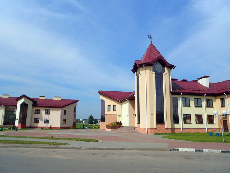 Васілішкі. Аграгарадок